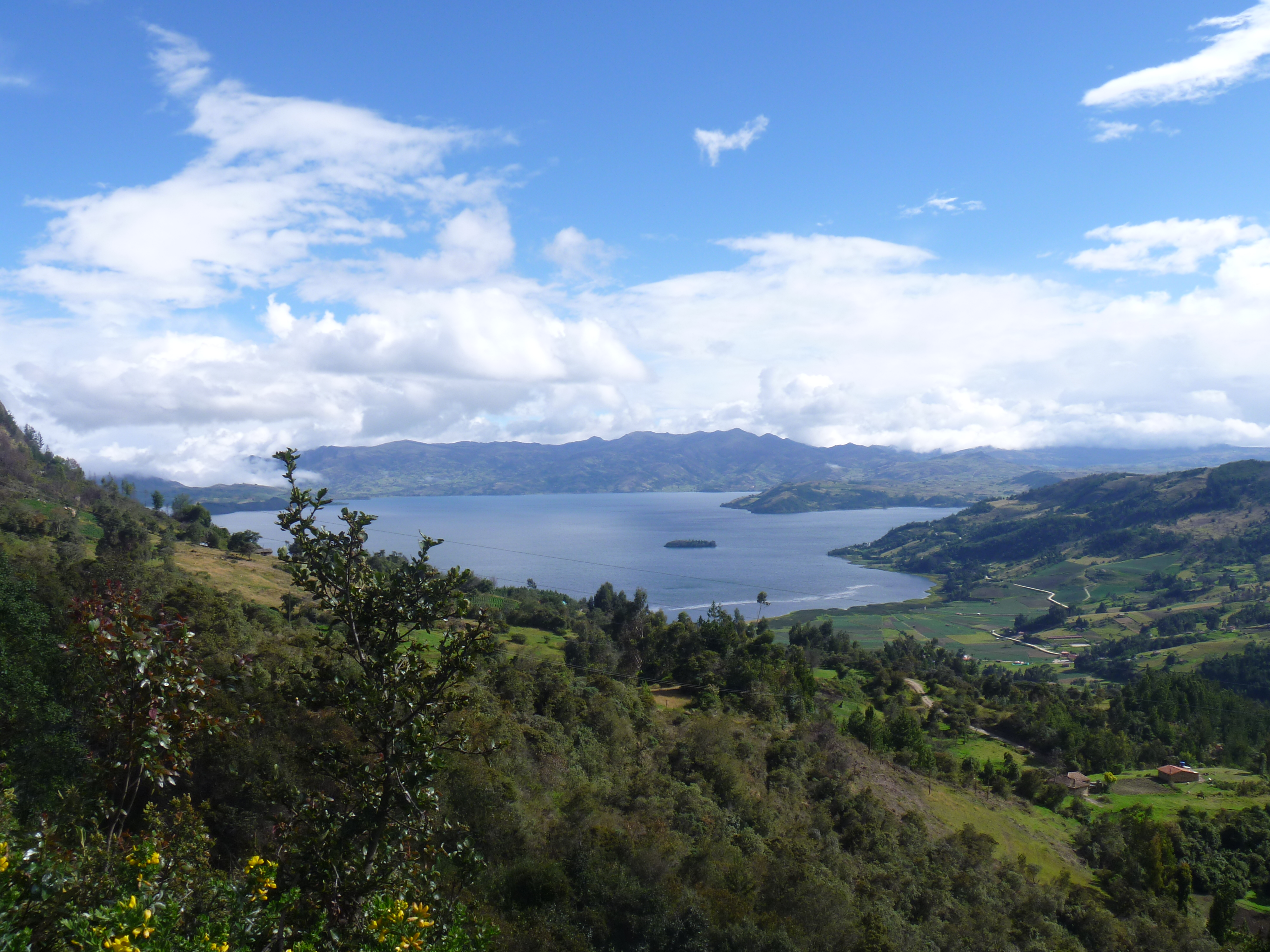 Vista de la laguna de tota.